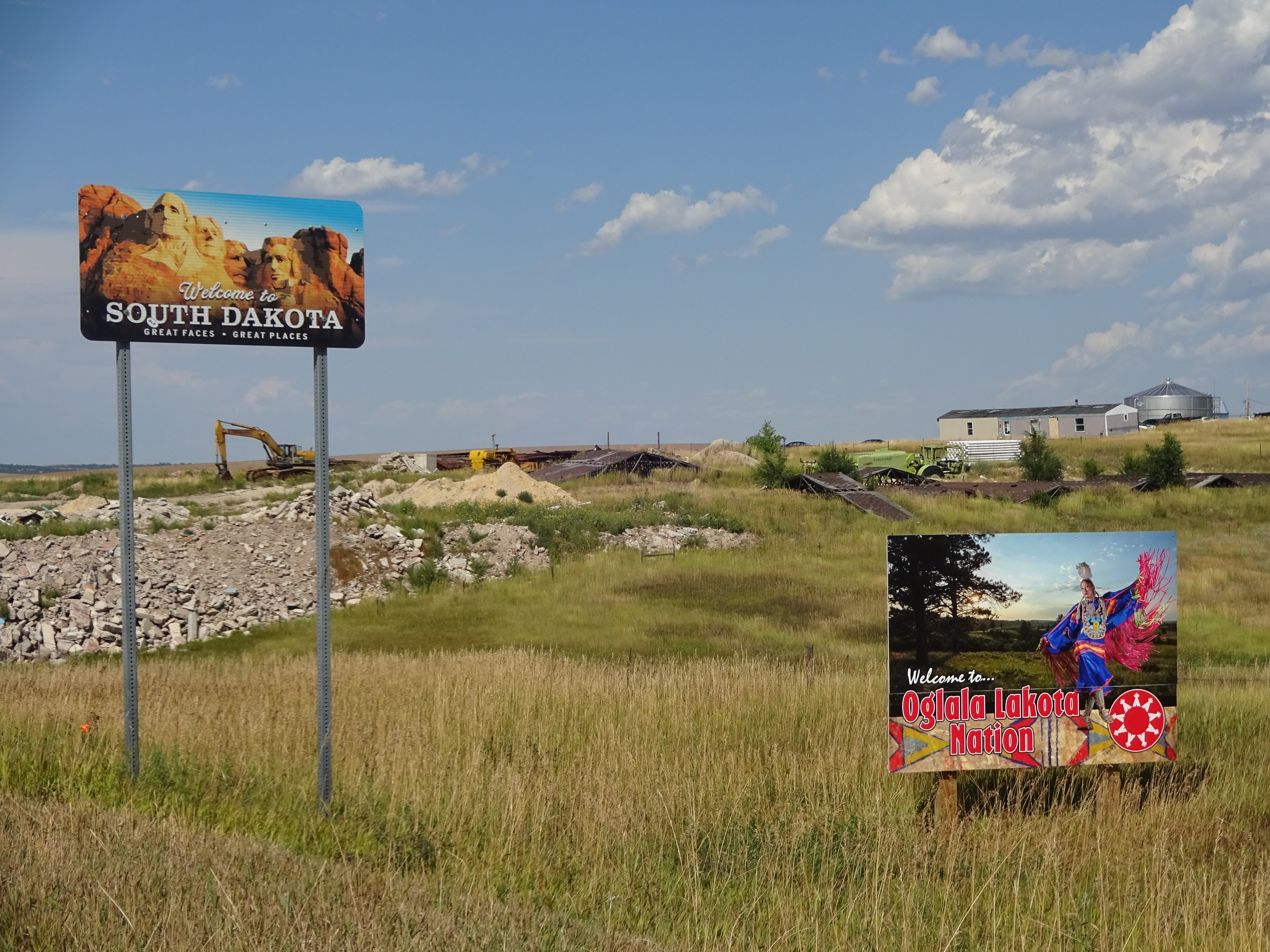 SD and Oglala Lakota Nation